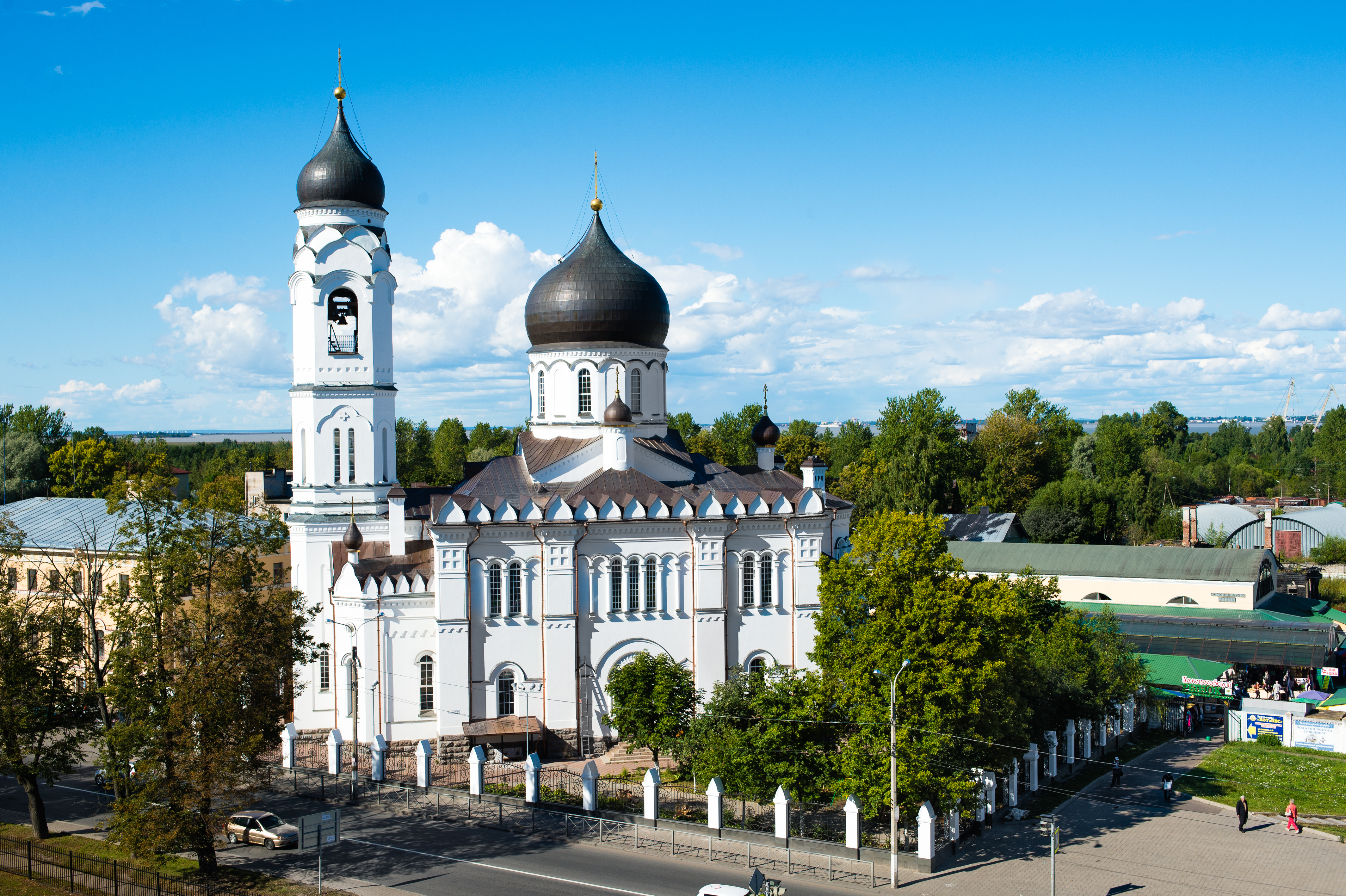 Внешний вид